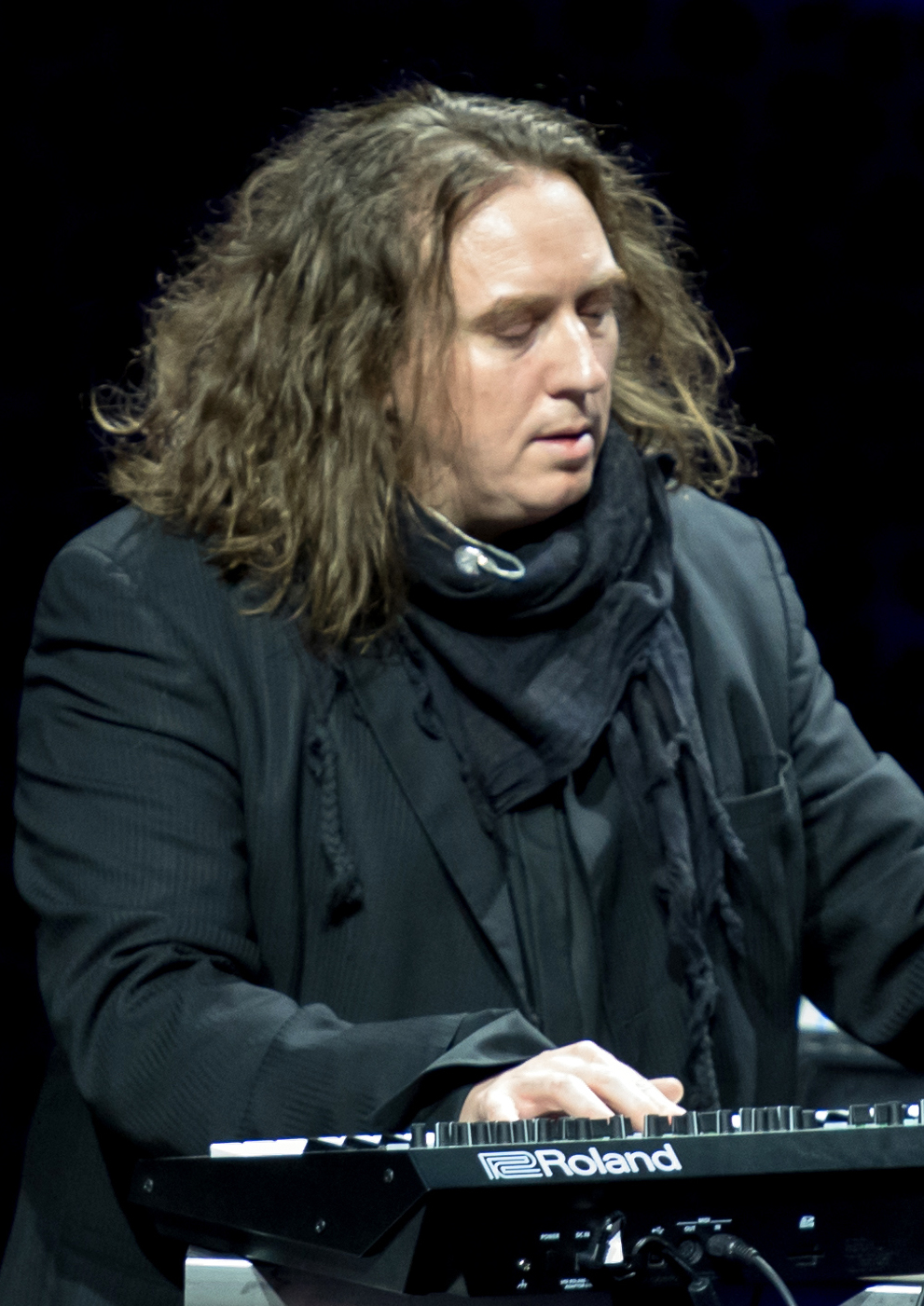 Tangerine Dream bei der Quantum of Electronic Evolution Tour in der Elbphilharmonie Hamburg 2018